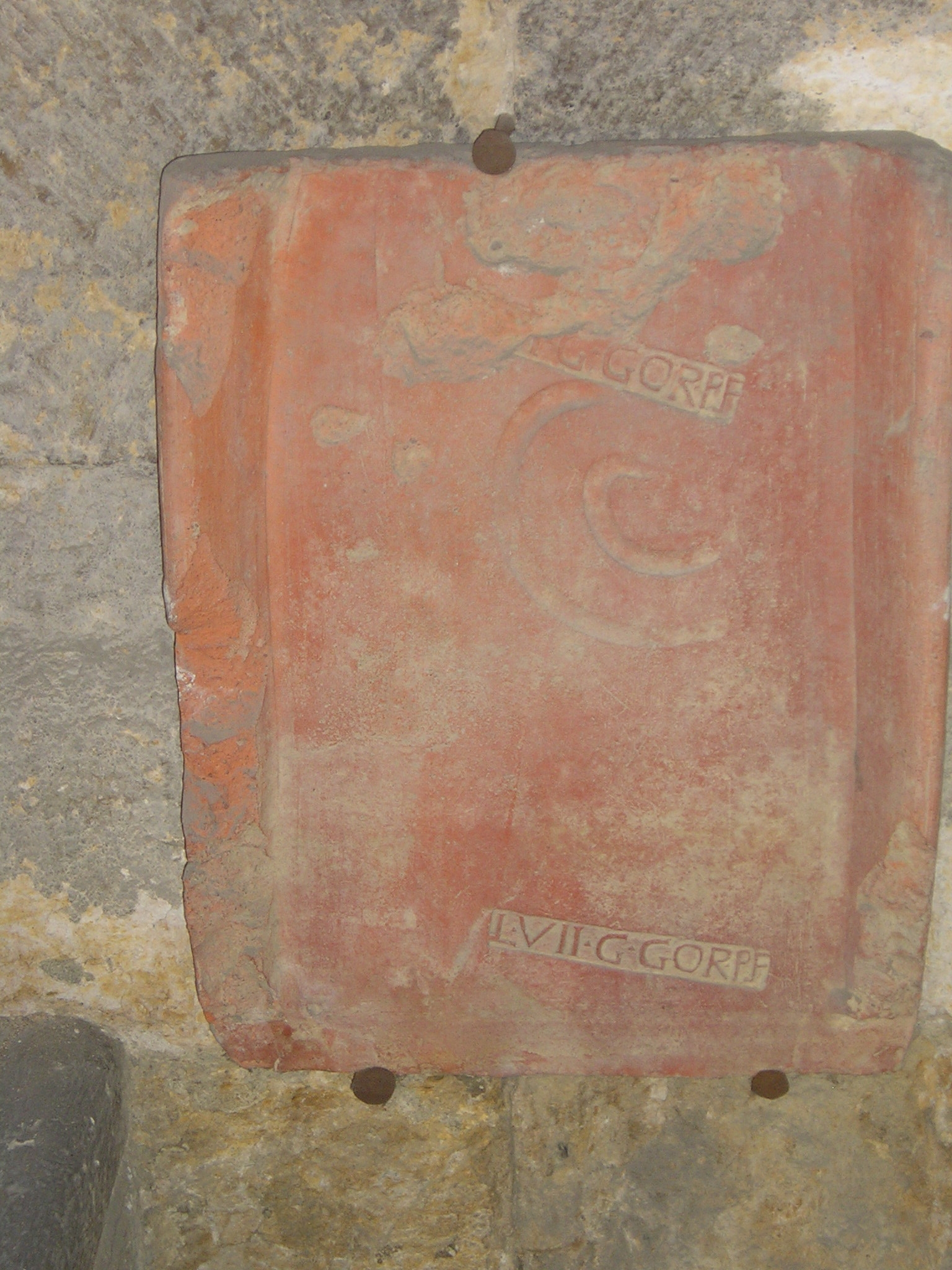 Tegula romana procedente de Legio (León, España) realizada a mediados del siglo III por soldados de la Legio VII Gemina con la figlina L(egio) VII G(emina) GORD(iana) P(ia) F(elix). CIL II 2667 = CIL II 6252 = AE 1916, 70